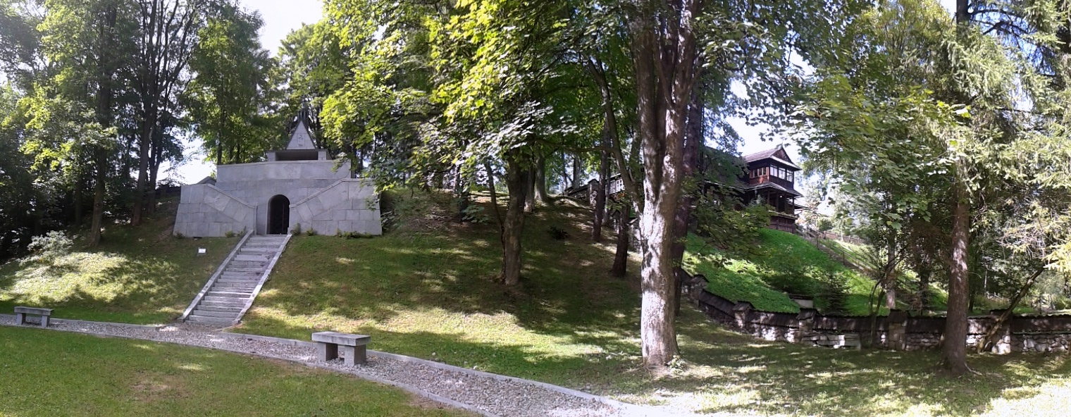 Zakopane, willa Harenda, ob. Muzeum Jana Kasprowicza, 1920